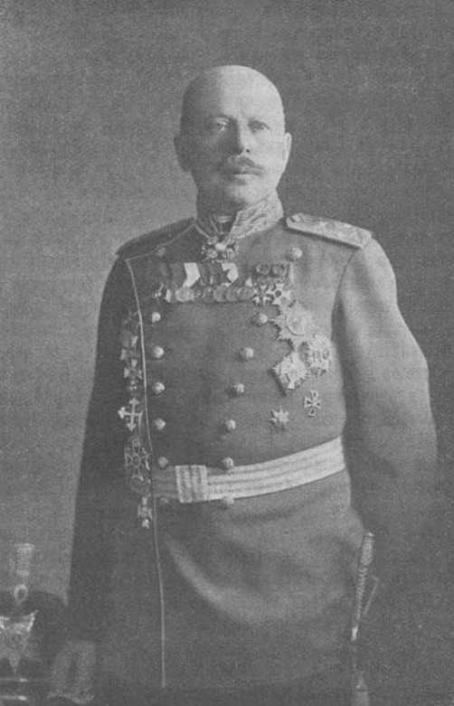 Андрей Медардович Зайончковский, русский генерал, герой Первой мировой войны.